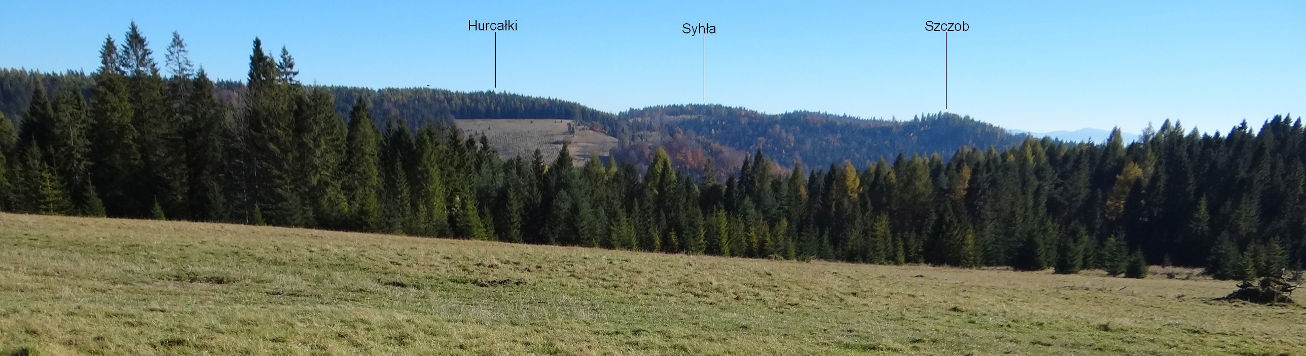 Widok z polan na Jesioniku na grzbiet opadający z Małego Rogacza do przełęczy Rozdziela